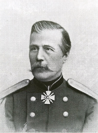 Веймарн, Фёдор Петрович